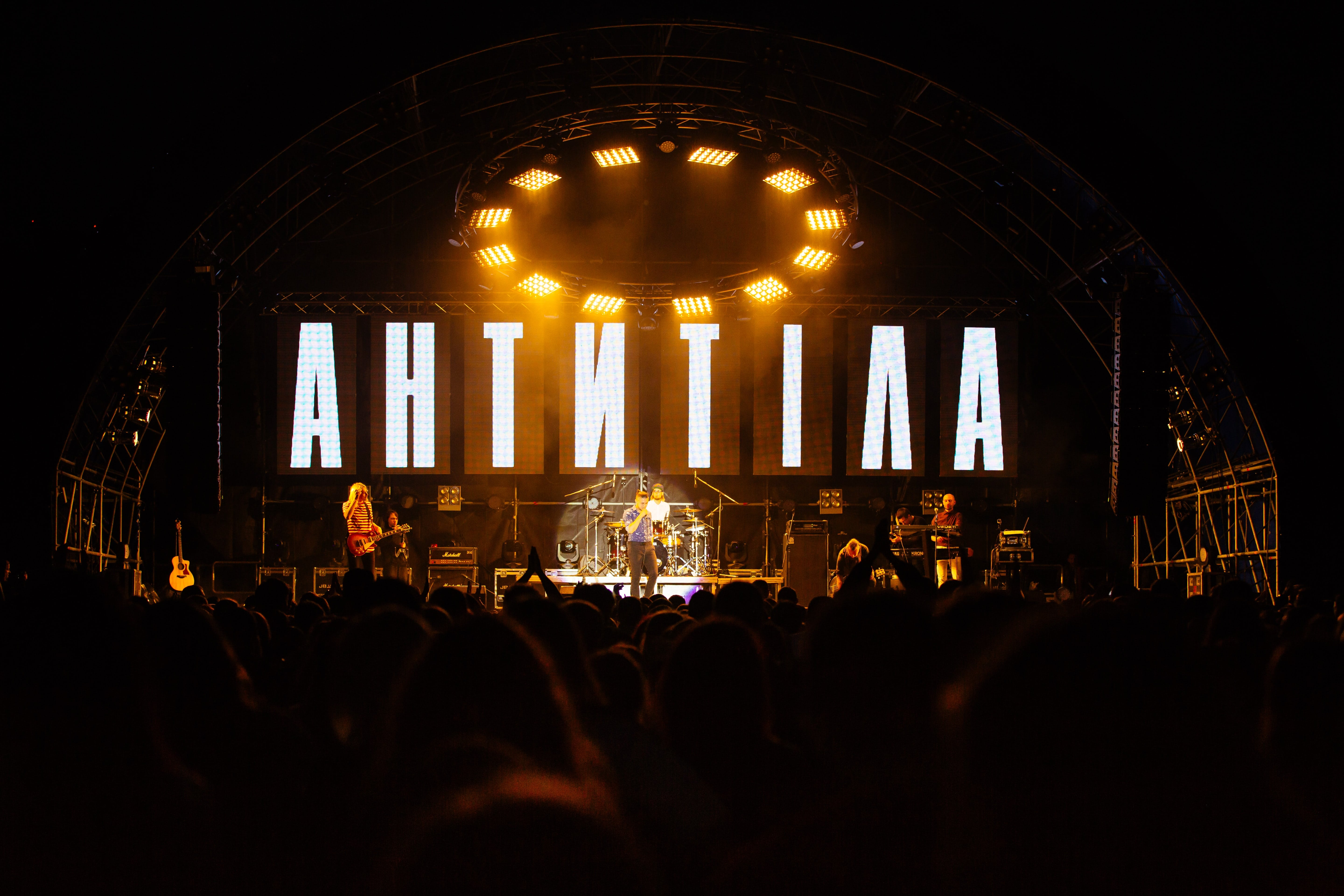 Антитіла. Мега фінал туру Сонце у Києві. 25 травня